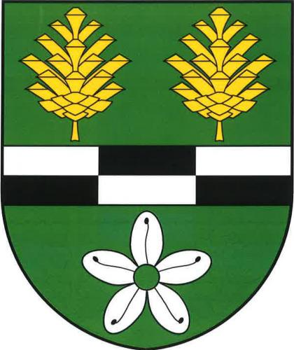 Znak obce Hranice